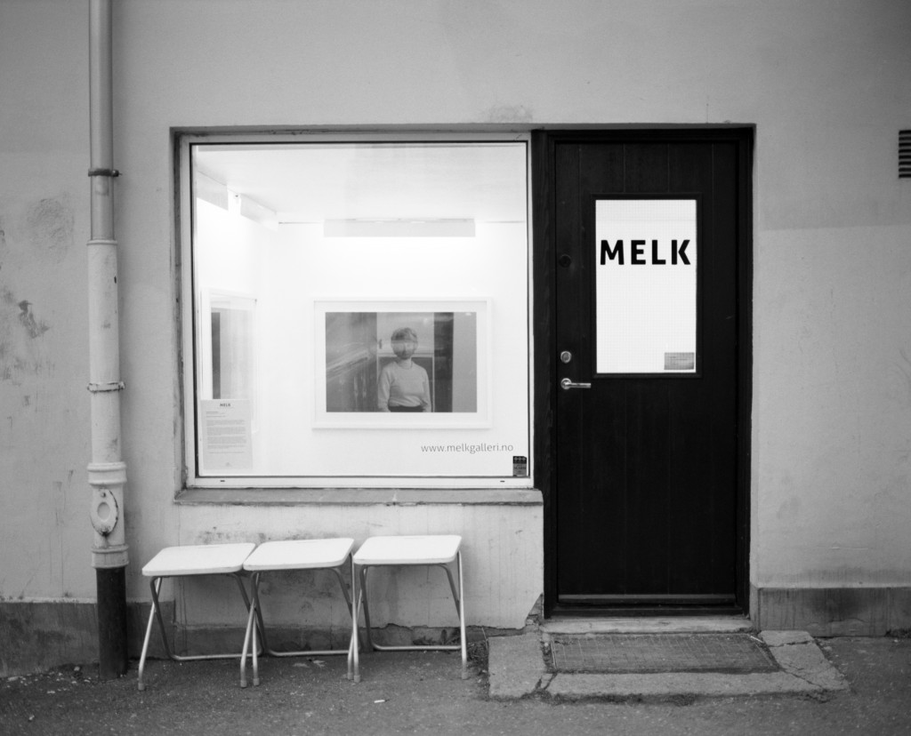 MELK galleri fasade. Københavngata 4 Oslo